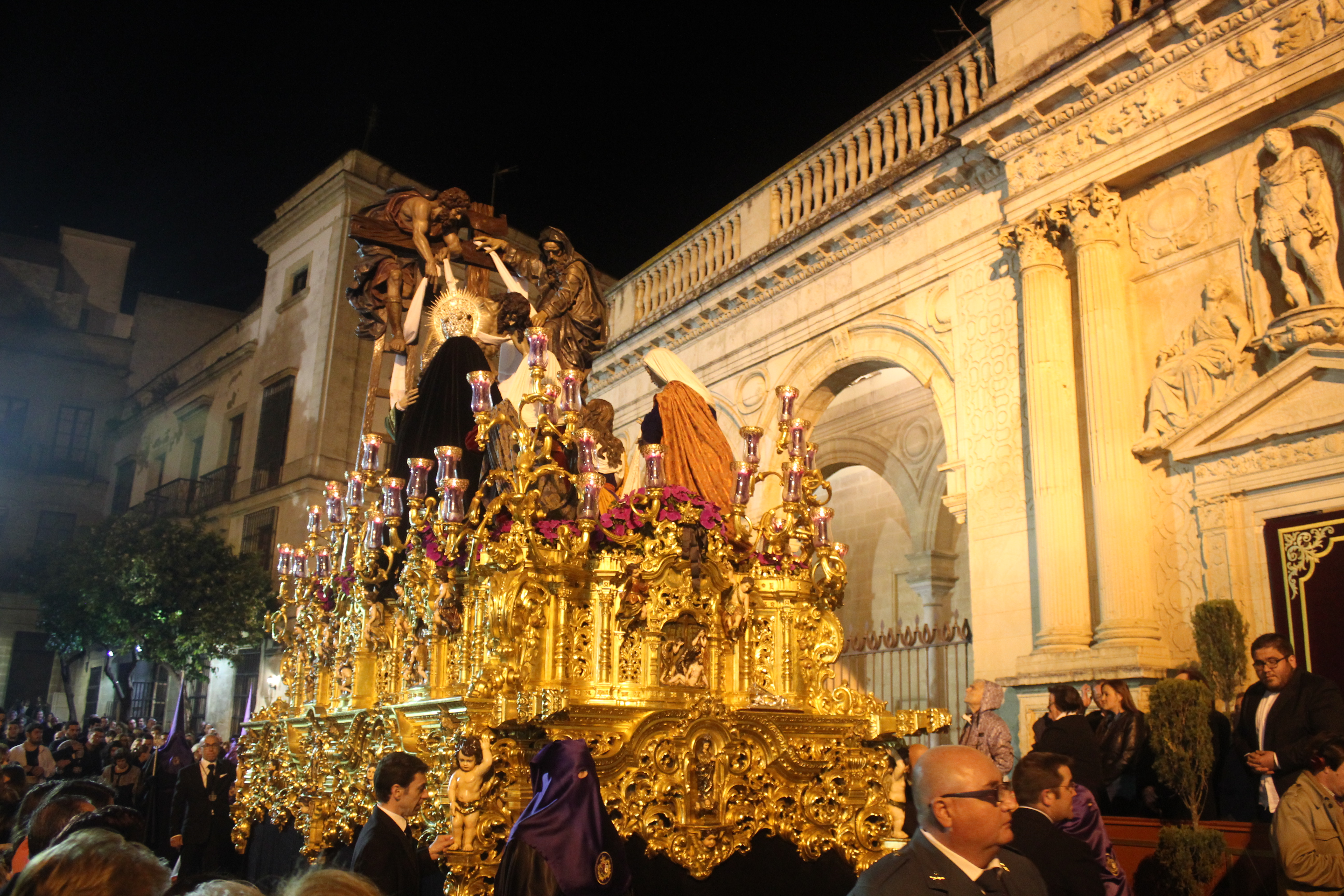 Hermandad de la Soledad procesionando en la Semana Santa de Jerez de la Frontera 2016 (Andalucía, España) This is a photography of a Folklore festival in Spain (Wikidata id Q6124533).